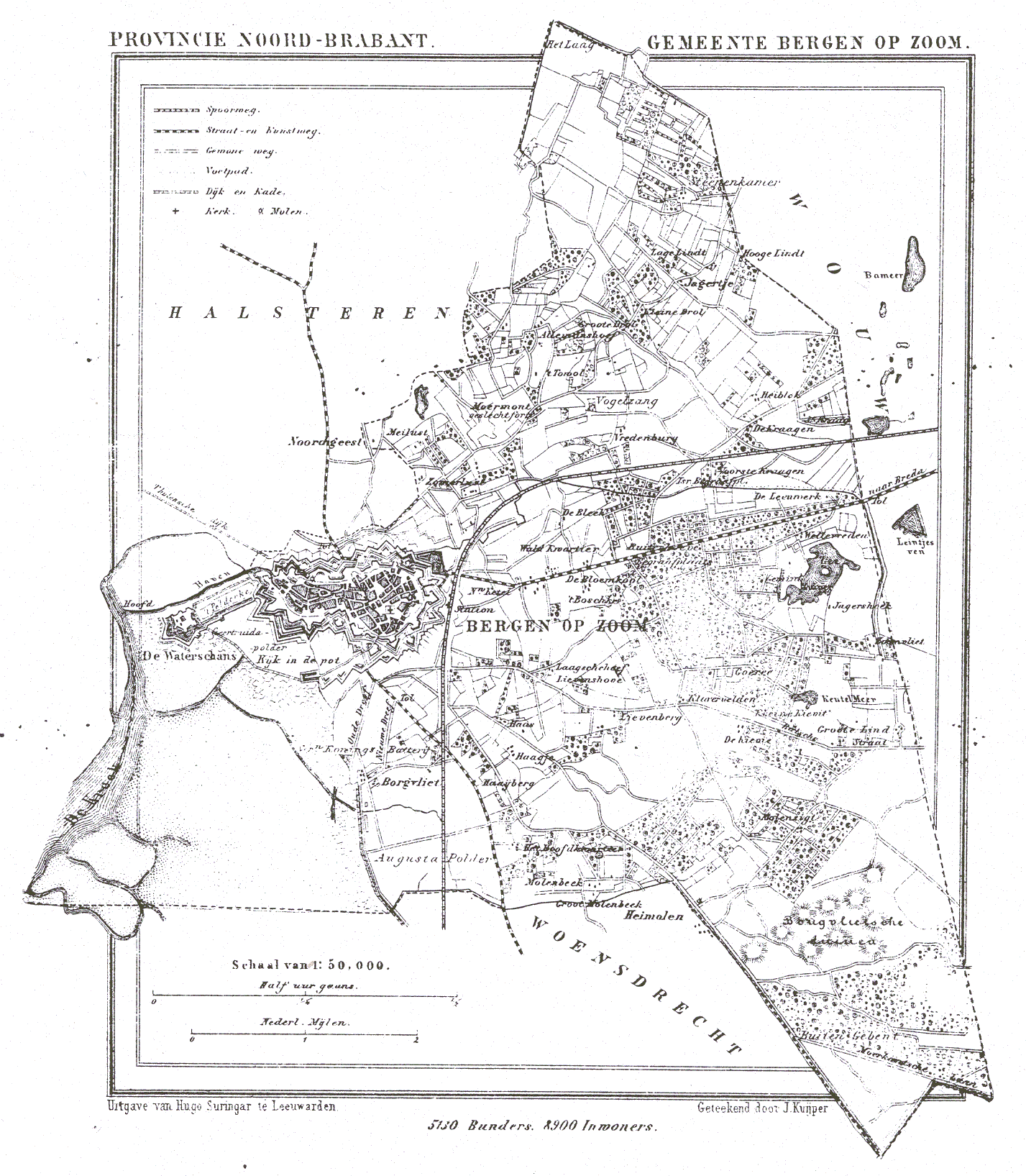 Nederland, Noord-Brabant, Gemeente Bergen op Zoom